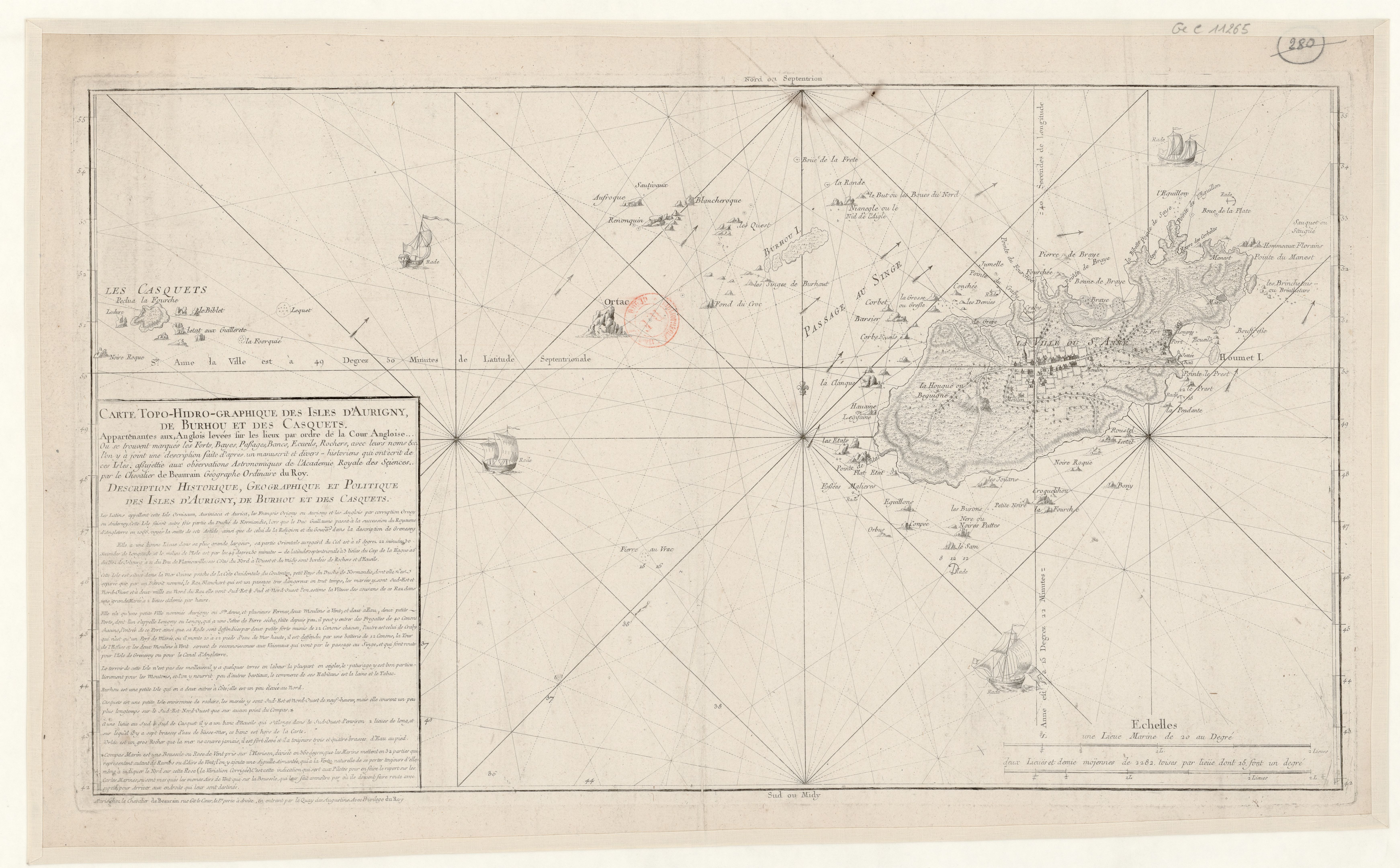 Carte topo-hidro-graphique des Isles d'Aurigny, de Burhou, et des Caquets. Appartenantes aux Anglois levées sur les lieux par ordre de la cour angloise... Ou se trouvent marqués les Forts, Bayes, Paysages, Bancs, Ecueils, Rochers, avec leurs noms etc. / par le chevalier de Beaurain